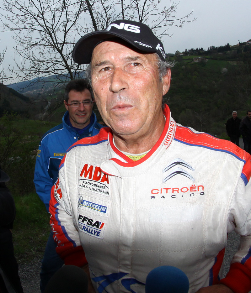 Dany Snobeck au Lyon-Charbonnières 2012